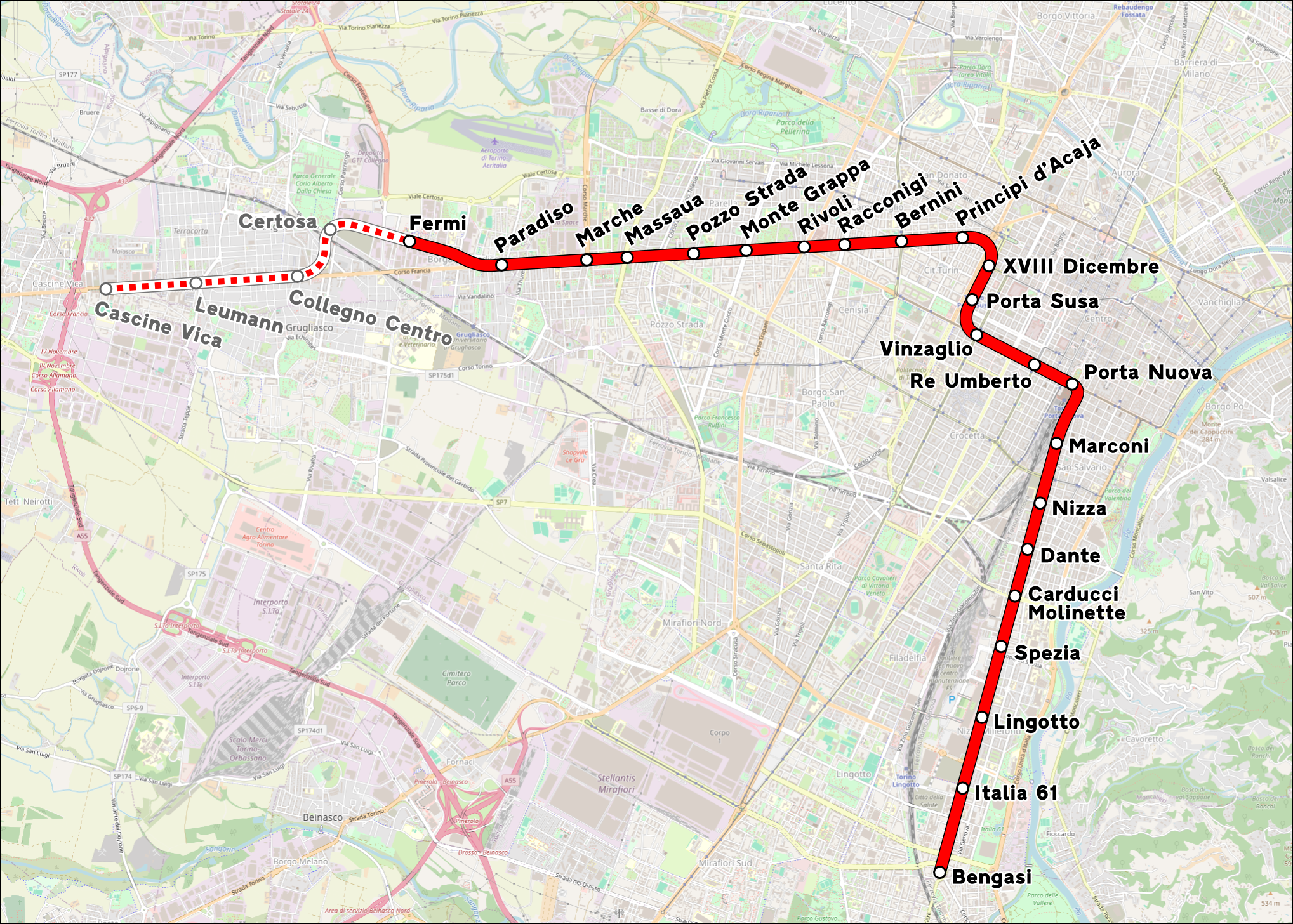 Mappa della metropolitana di Torino. This map may be incomplete, and may contain errors. Don't rely solely on it for navigation.